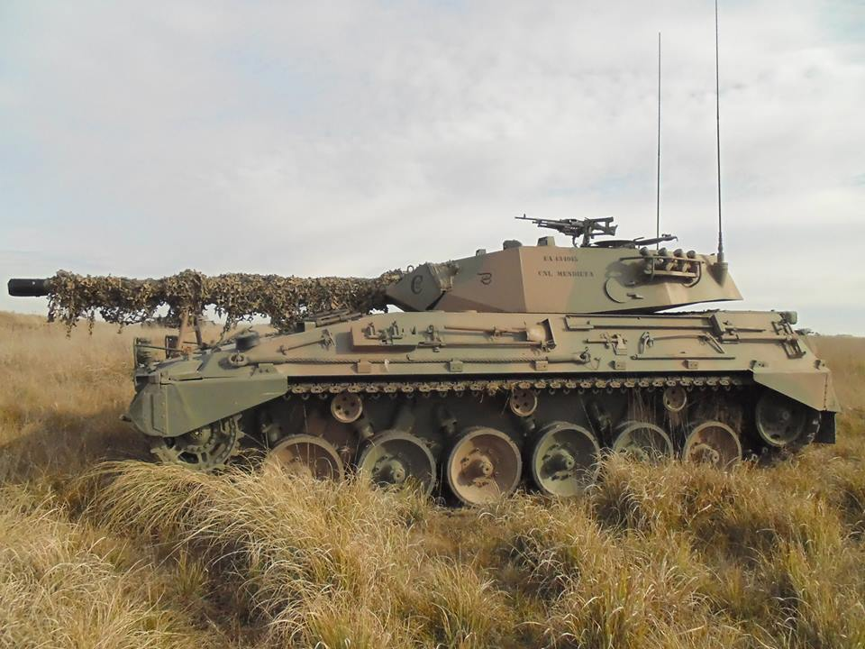 Tanque TAM